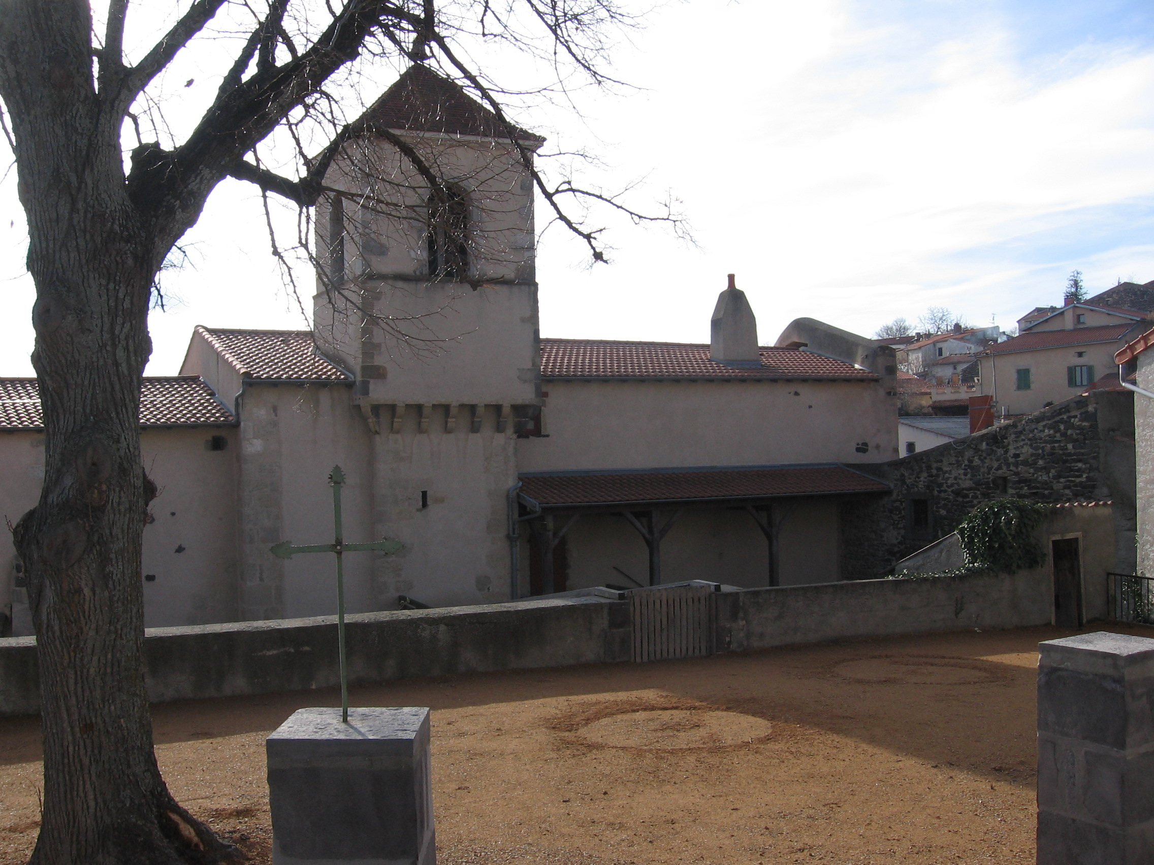 Eglise de Gergovie (Auvergne)